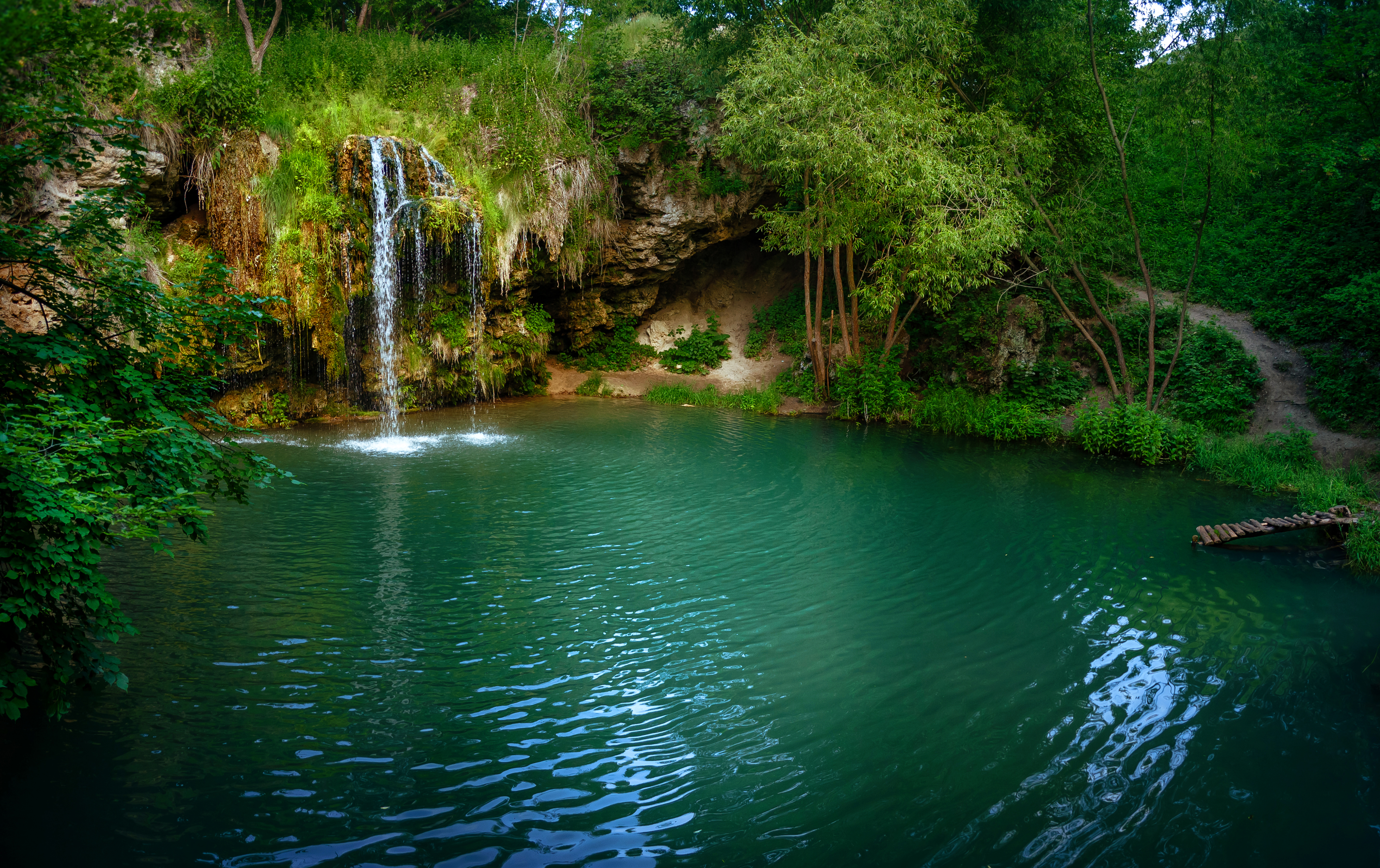 Лагуна і водоспад Бурбун на р. Бобровець. Бобровицький, Дунаєвецький район, між селами Лисець та В. Побійна у долині р. Бобровець